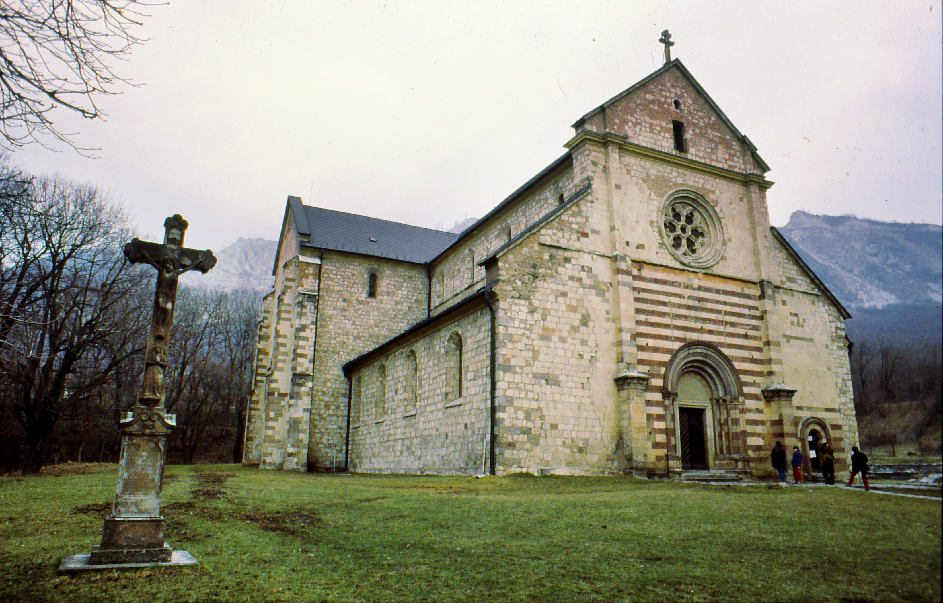 Bélapátfalva, Apátsági templom, Románkori művészet